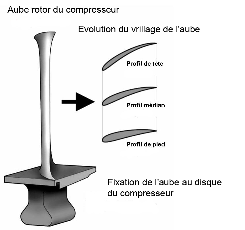 Description d'une aube de rotor de compresseur traduction